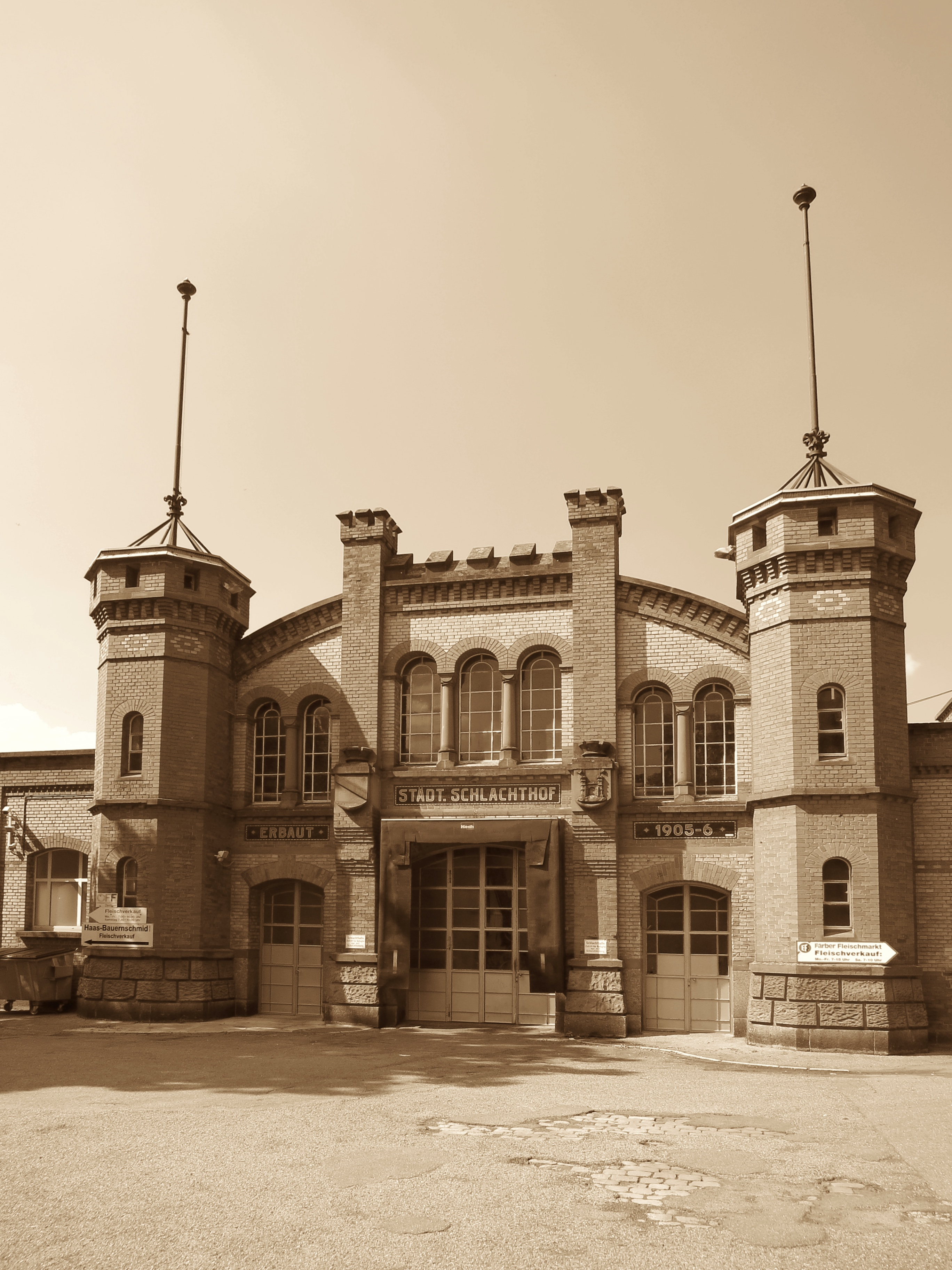 Offenburg (Ortenaukreis, Baden-Württemberg, Deutschland) - Der Schlachthof.